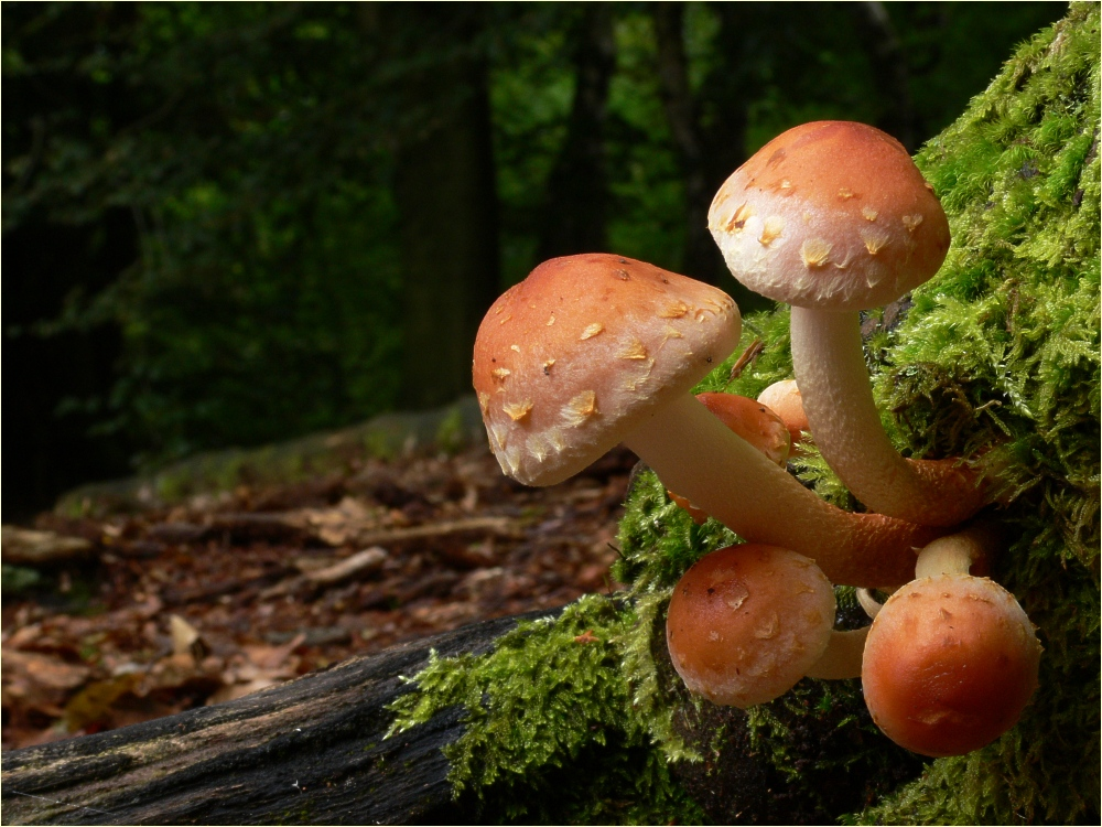 Ziegelrote Schwefelköpfe (Hypholoma lateritium) im Urwald Sababurg